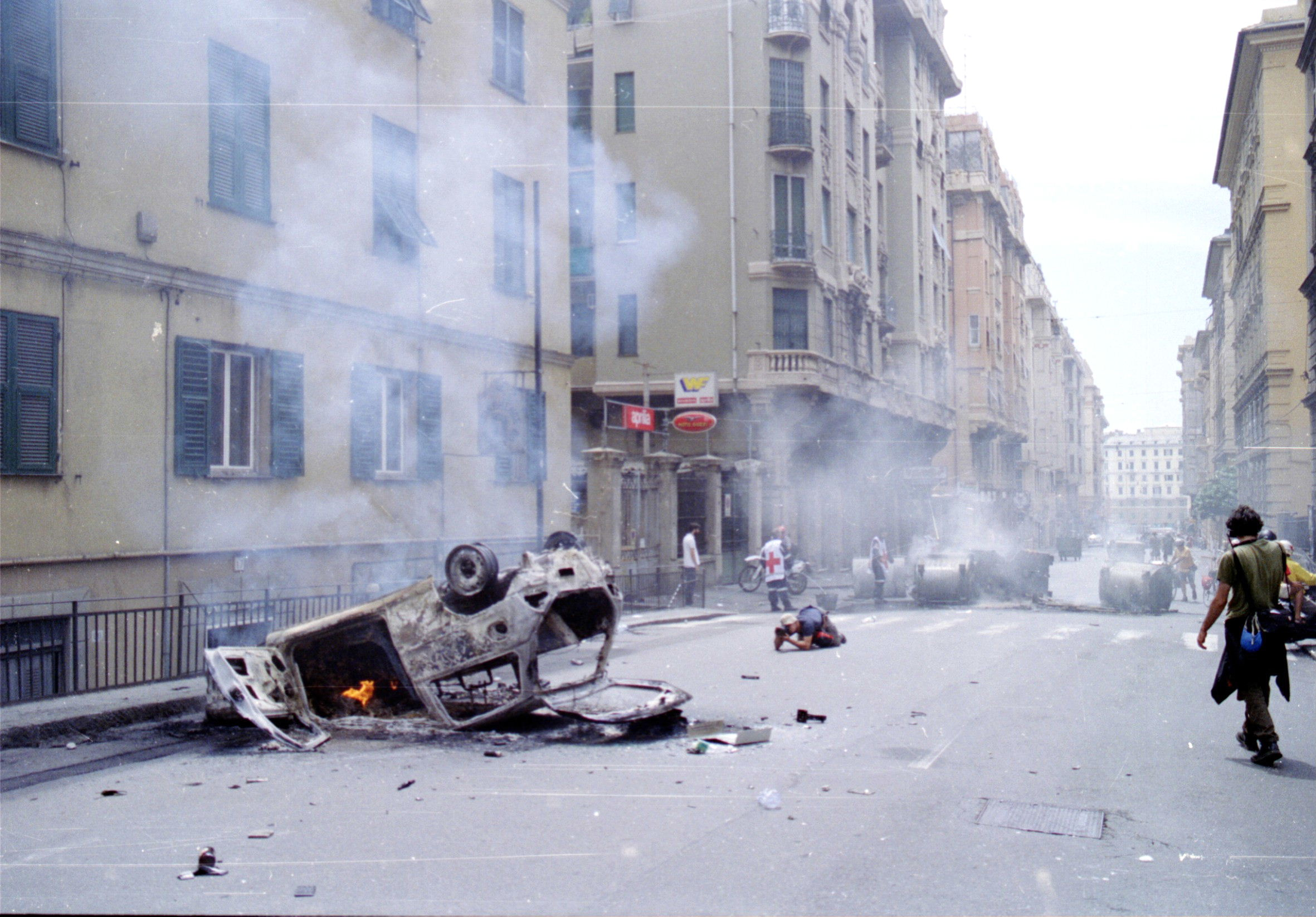 Genova - Fatti del G8 del 20 luglio 2001 Auto incendiata in Via Montevideo